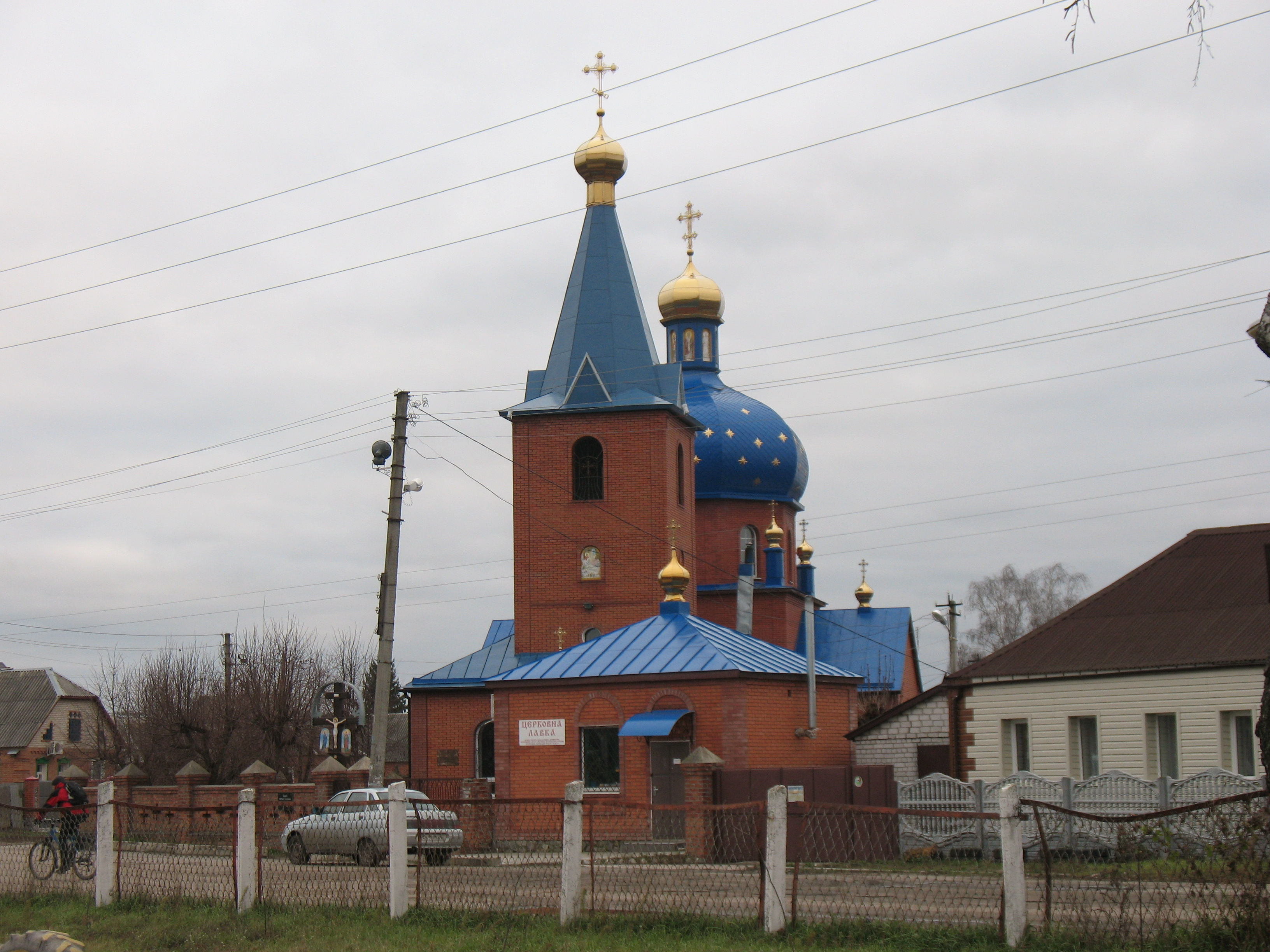 Мерефа Православная церковь